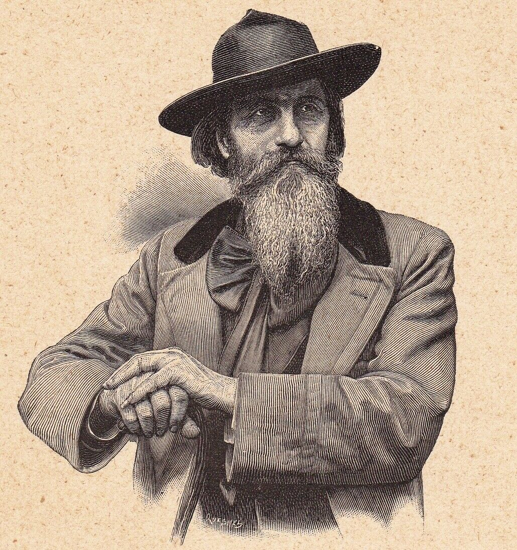 Anarchist Amilcare Cipriani (1843-1918)